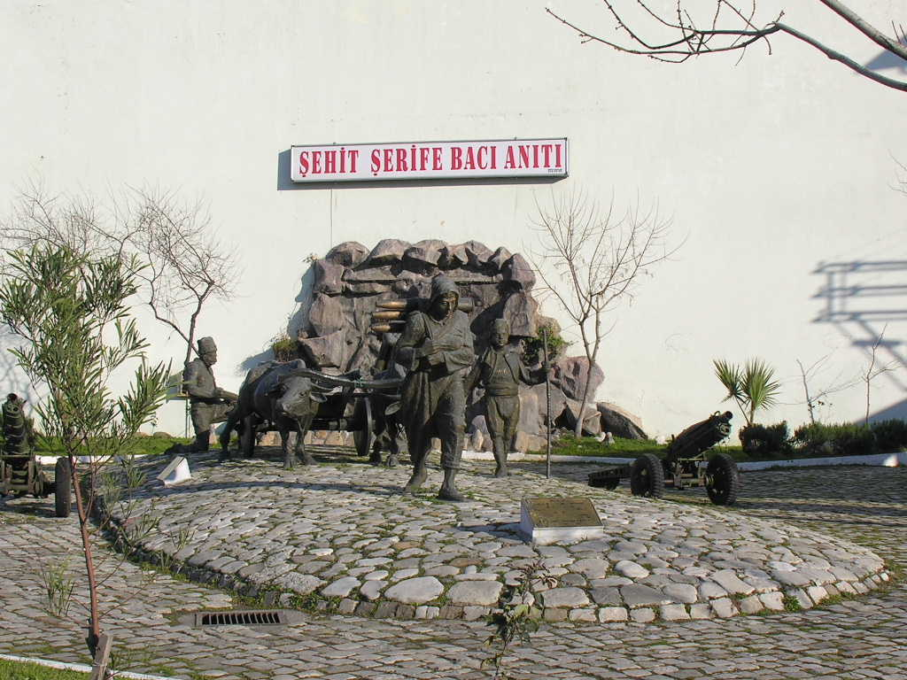 Şehit Şerife Bacı Anıtı